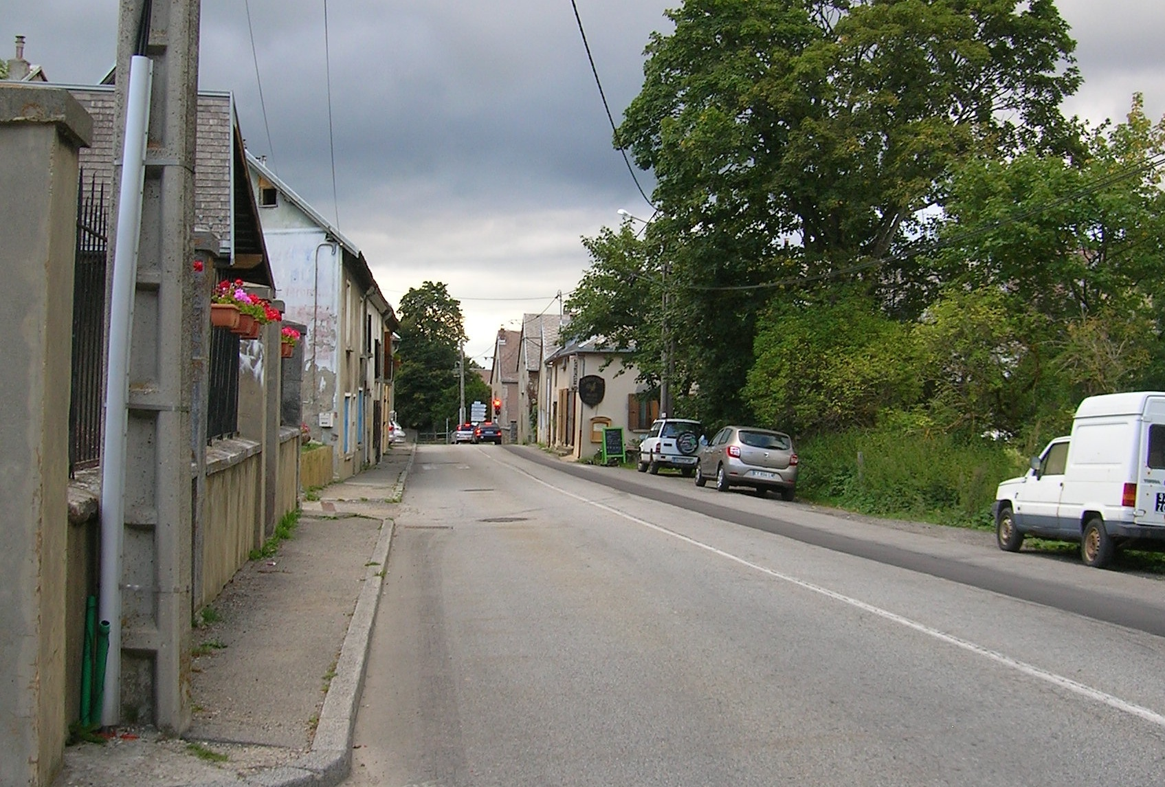 Route Napoléon à Saint-Théoffrey, Isère, Rhone Alpes, France.